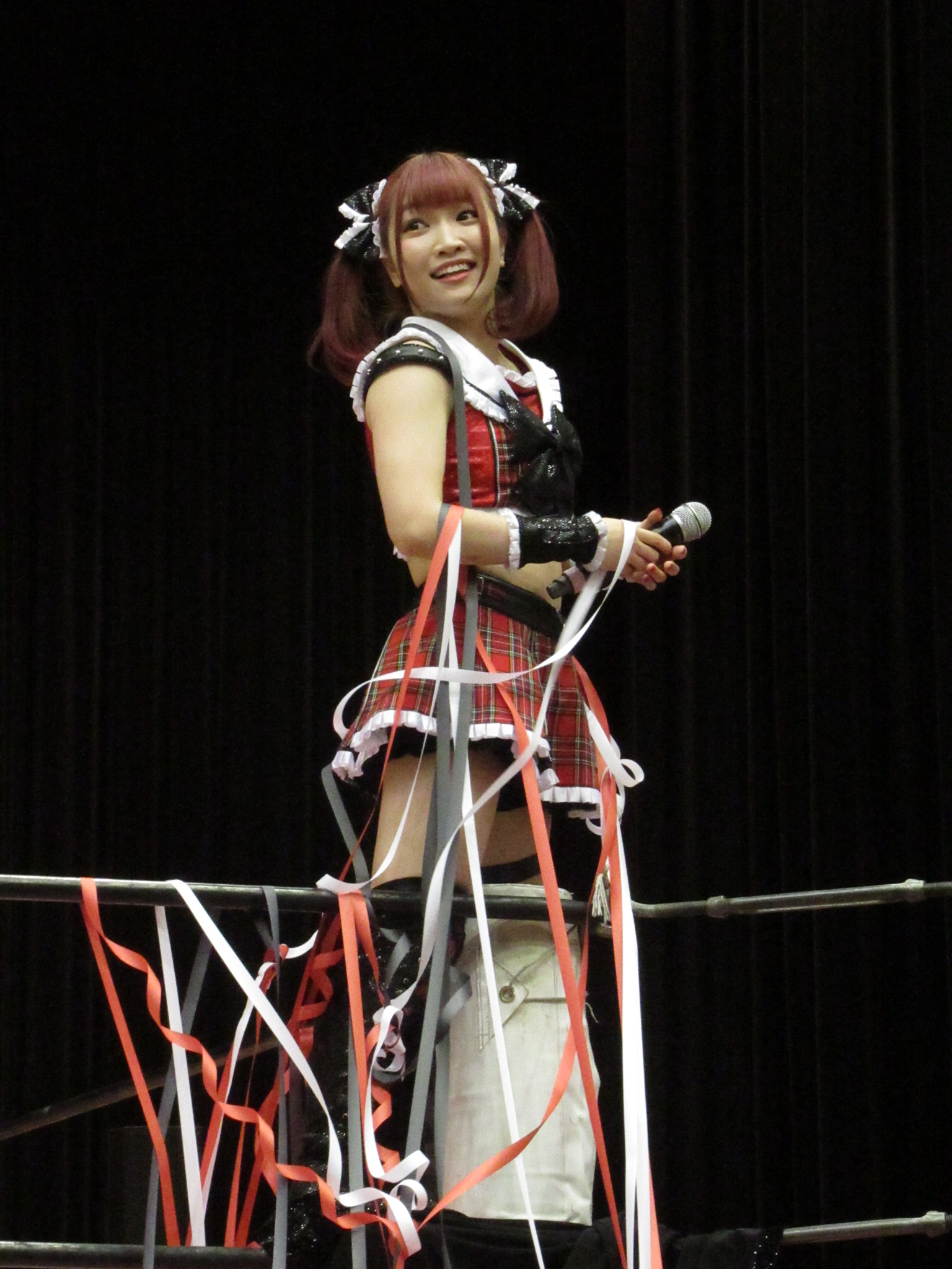 2020年1月、大阪大会にて